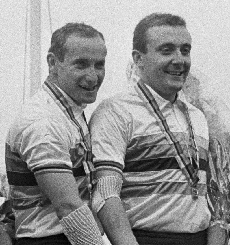 WK Wielrennen op de baan Amsterdam. Ceremonie tandem.